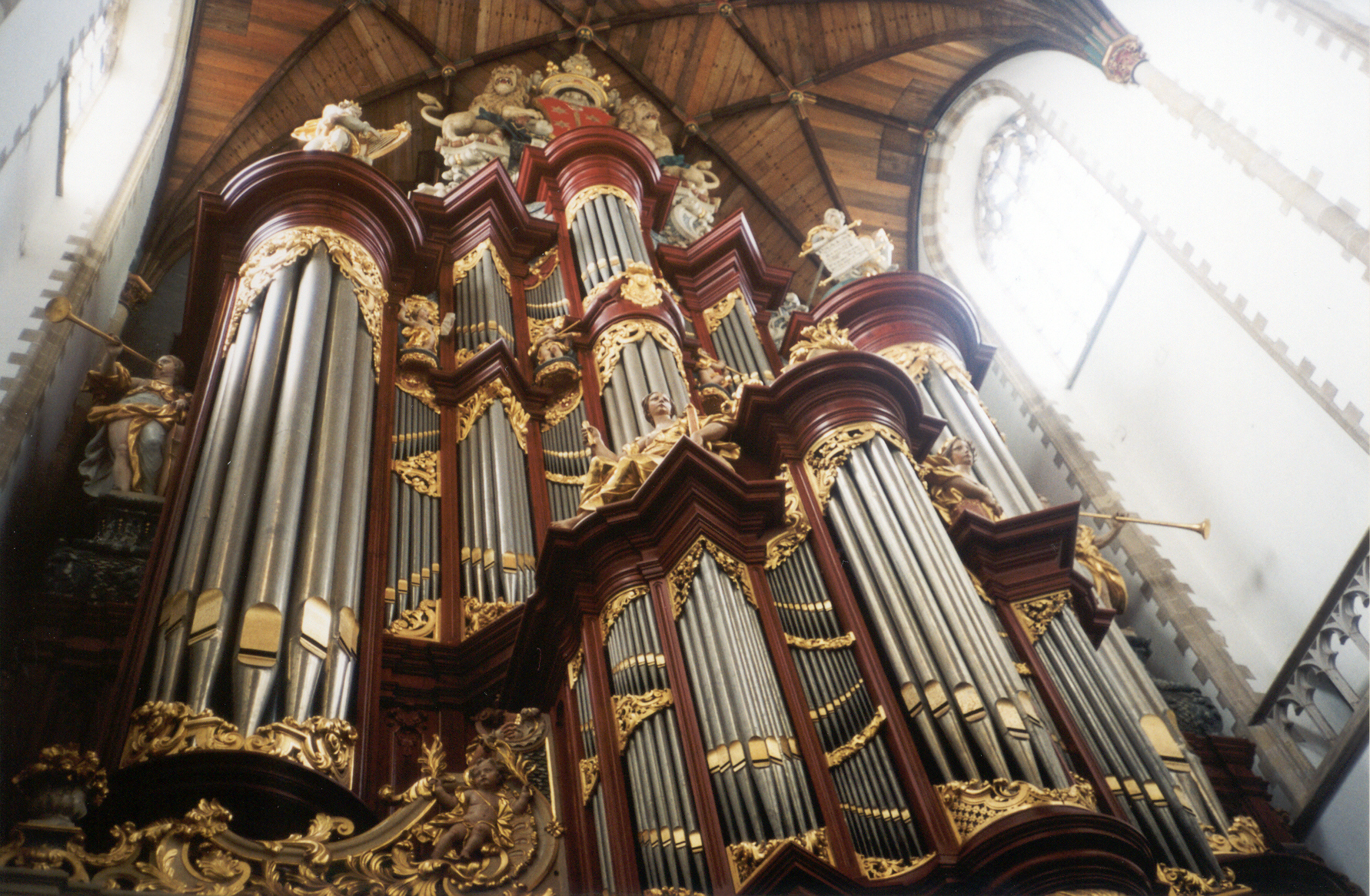 Organ at St Bavo, Haarlem, Netherlands